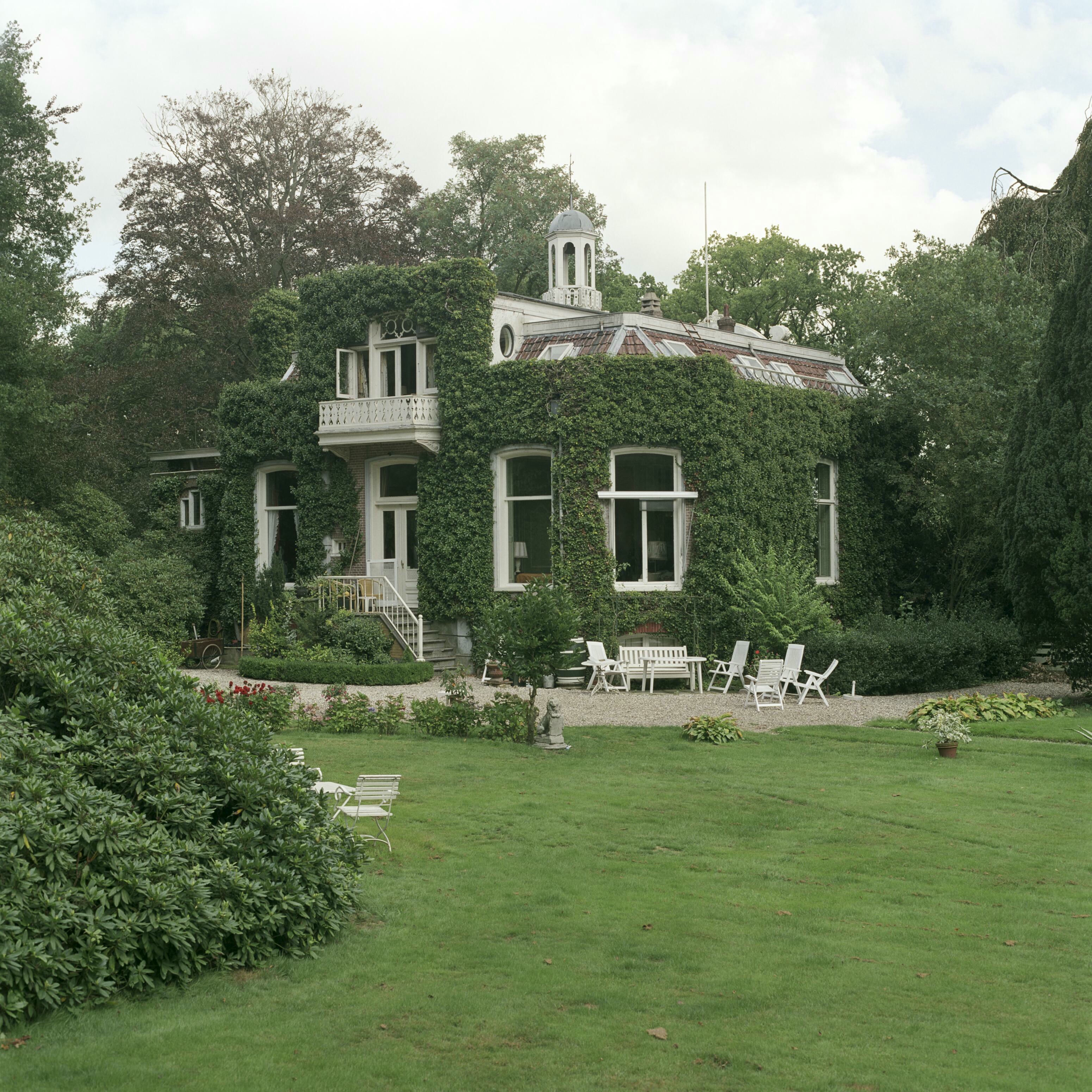 Boschoord: Overzicht van de achterzijde, gezien vanuit de tuin